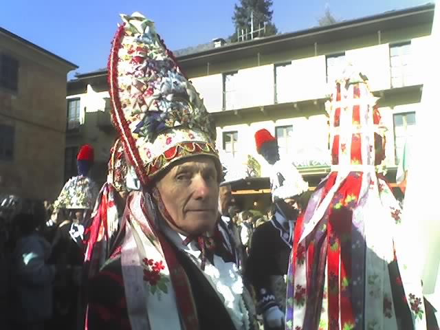 foto mia personale, Baìo2007